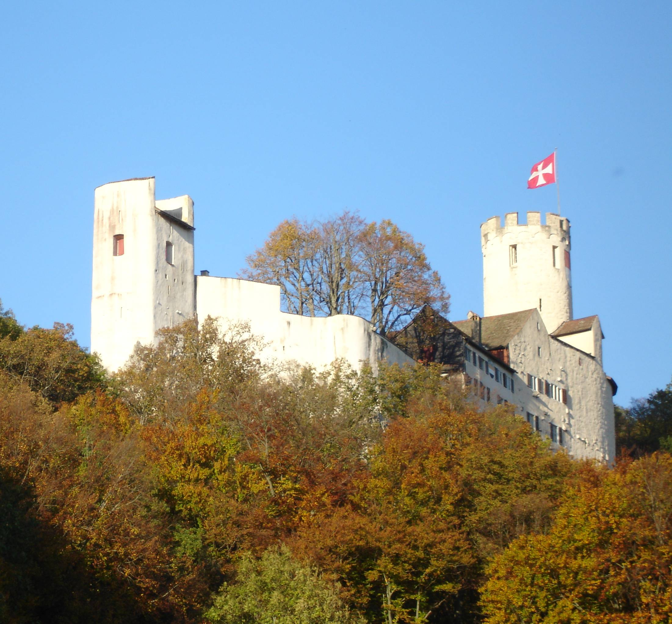 Schloss Neu-Bechburg in Oensingen, Switzerland